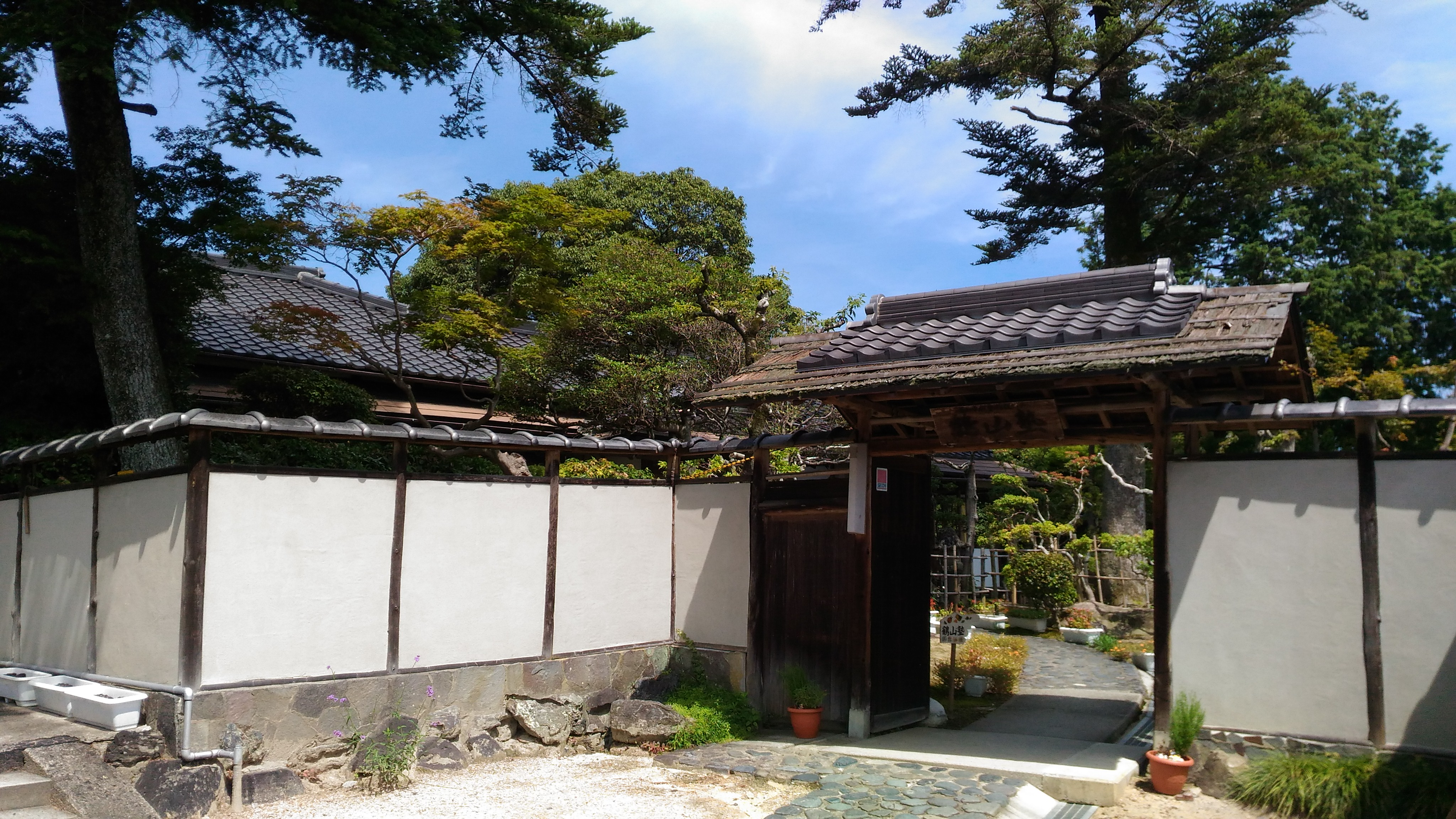 鶴山塾正門写真20170909